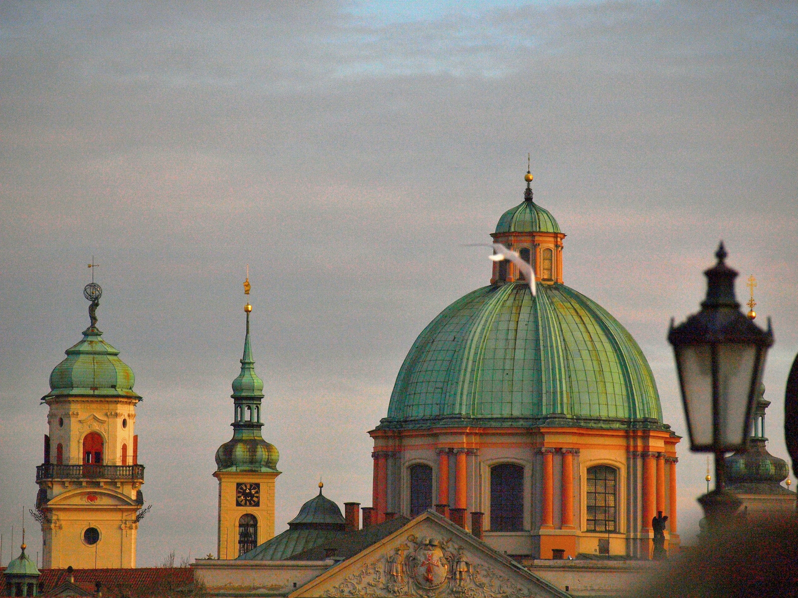 Praha, kostel sv. Františka z Assisi